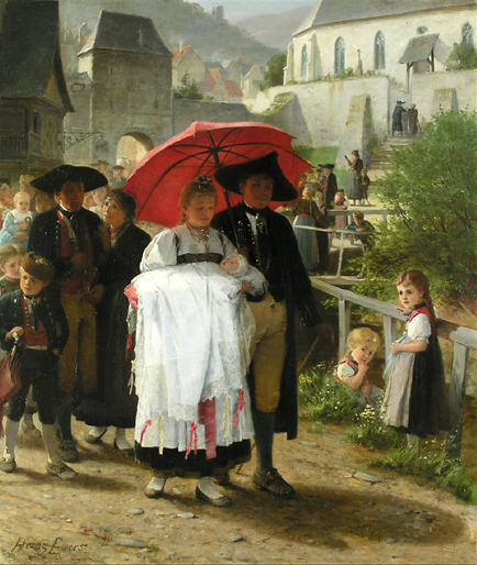 Auf dem Heimweg von der Taufe; Oil on canvas, 79 x 66 cm